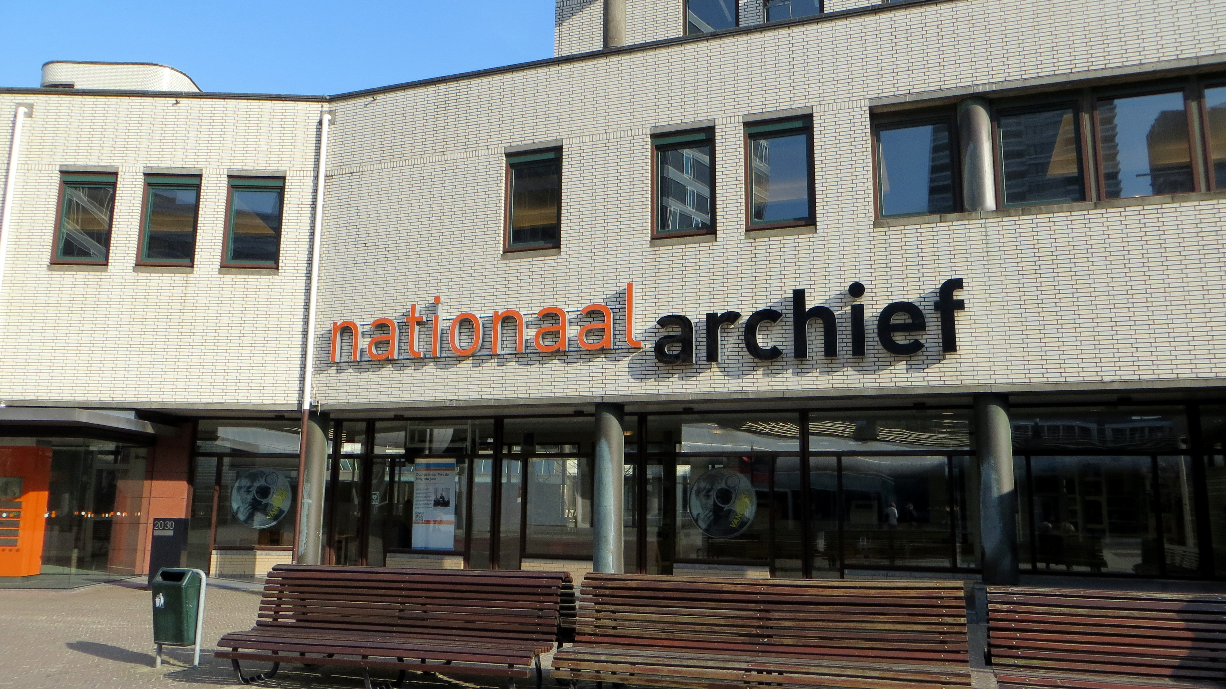 Фото з конференції GLAM-WIKI 2015